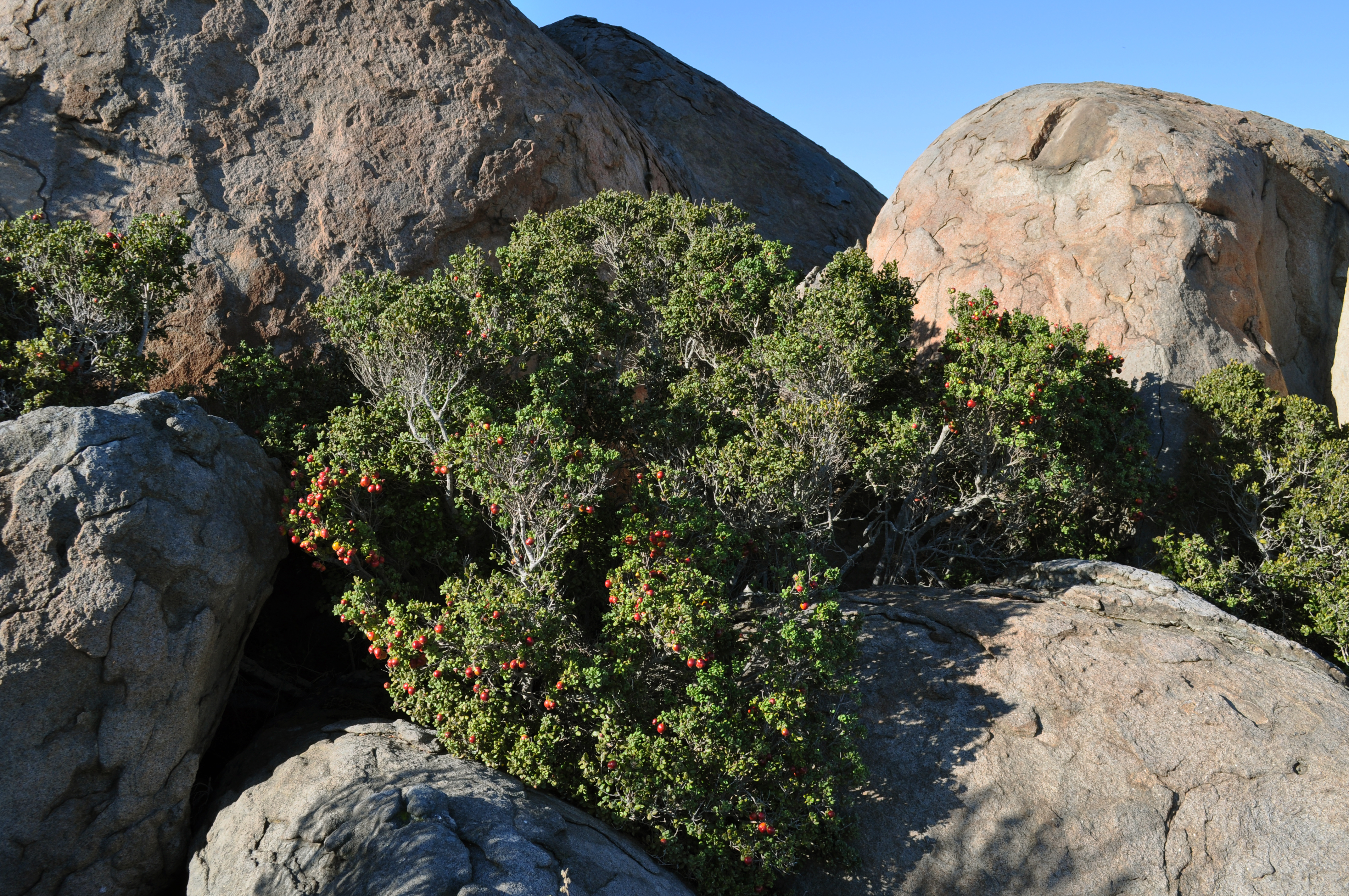 Hábito de crecimiento de M. coquimbensis